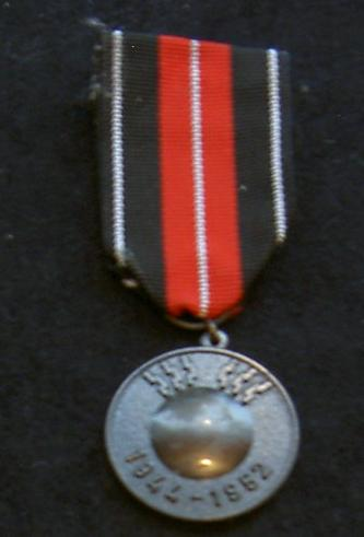 Order of merit of mine clearance